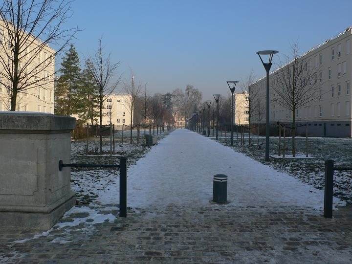 Brétigny-sur-Orge : Allée de LaFontaine